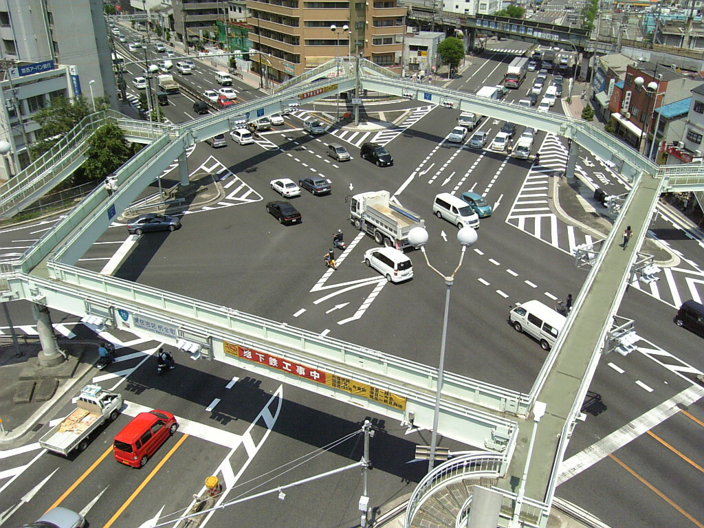 杭全交差点（大阪市東住吉区）交差点南東角のビル8階から撮影